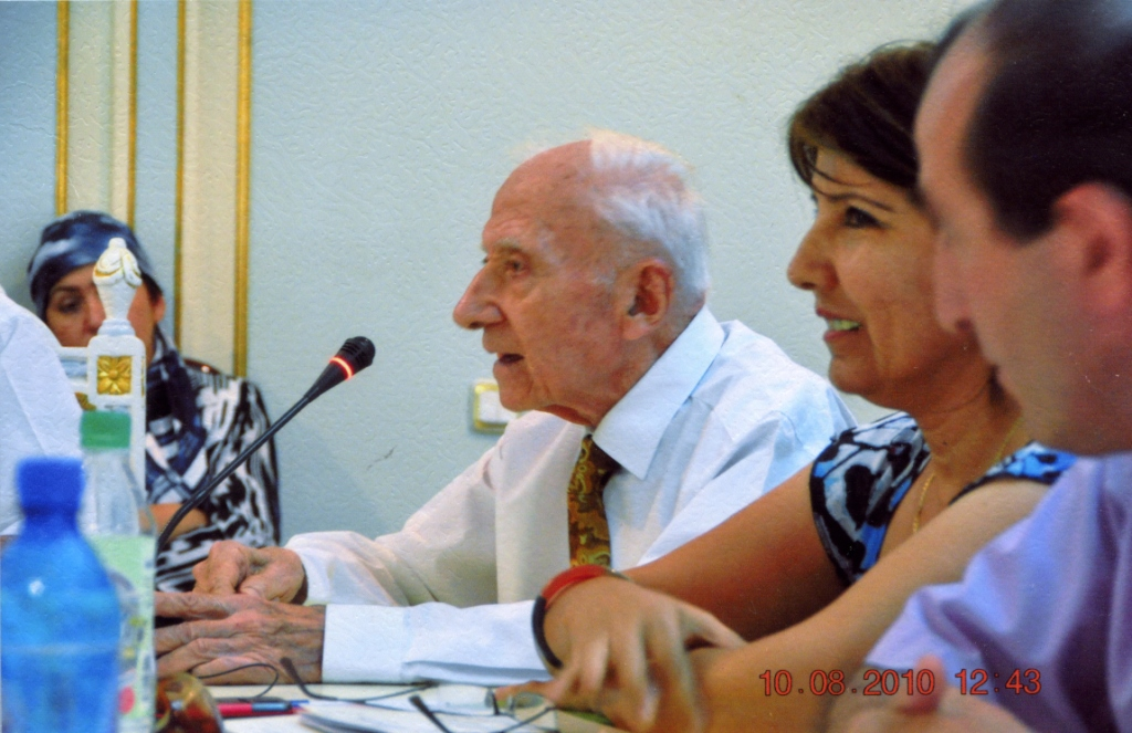 У микрофона ведёт дискуссию Камол Айни академик Академии наук Республики Таджикистан, (востоковед) на встрече с учеными - востоковедами